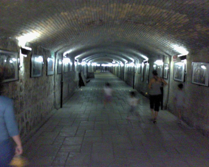 Canal de la Perla Canal de la Perla, Torreón Coahuila. Photographer: Salvador De los Reyes Delosrjs )